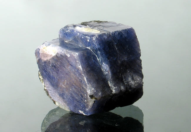 minerał; korund - szafir, pochodzenie Madagaskar, autor zdjęcia Stowarzyszenie Spirifer 10.07.2006r.